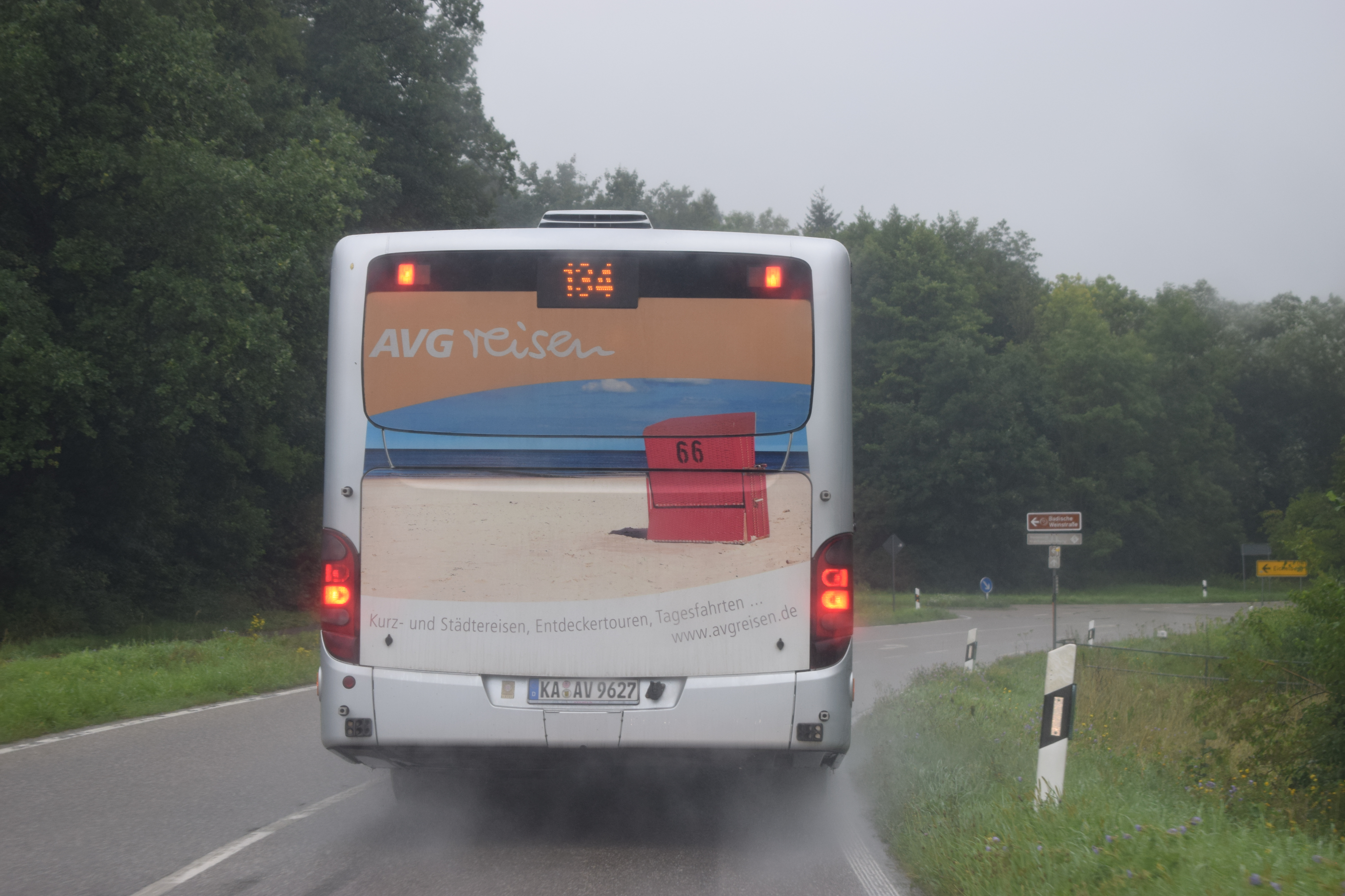 KVV Bus Linie 134 bei Eichelberg